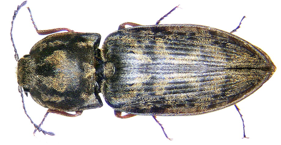 Prosternon tessellatum (Linné, 1758) Familie: Elateridae Groesse: 10-12 mm Verbreitung: Europa, Asien, Nordamerika Fundort: Germania, Bayern, Oberfranken, Kulmbach leg.det. U.Schmidt, 1973 Photo: U.Schmidt, 2005